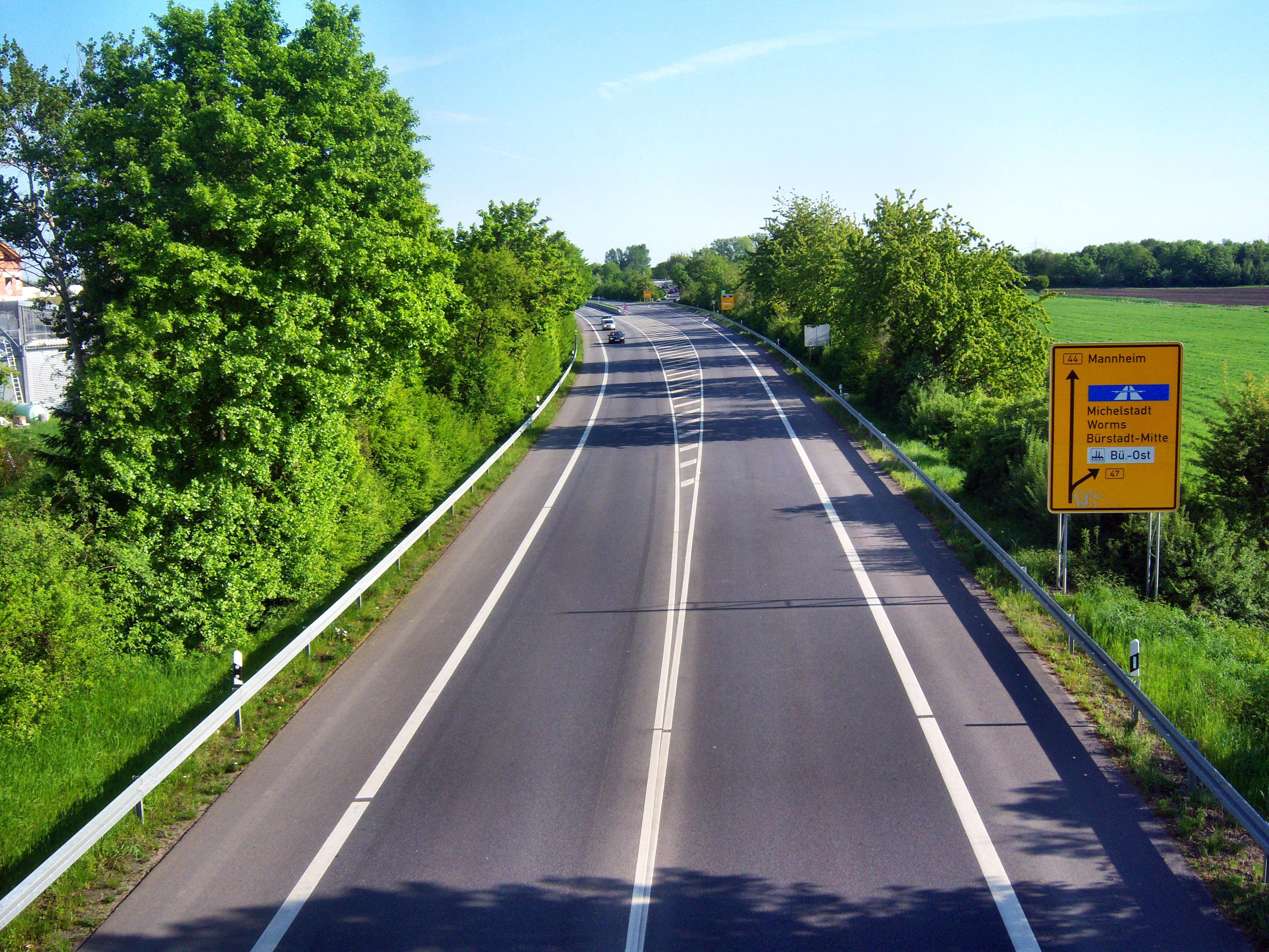 Bundesstraße 44 in Hessen bei Bürstadt